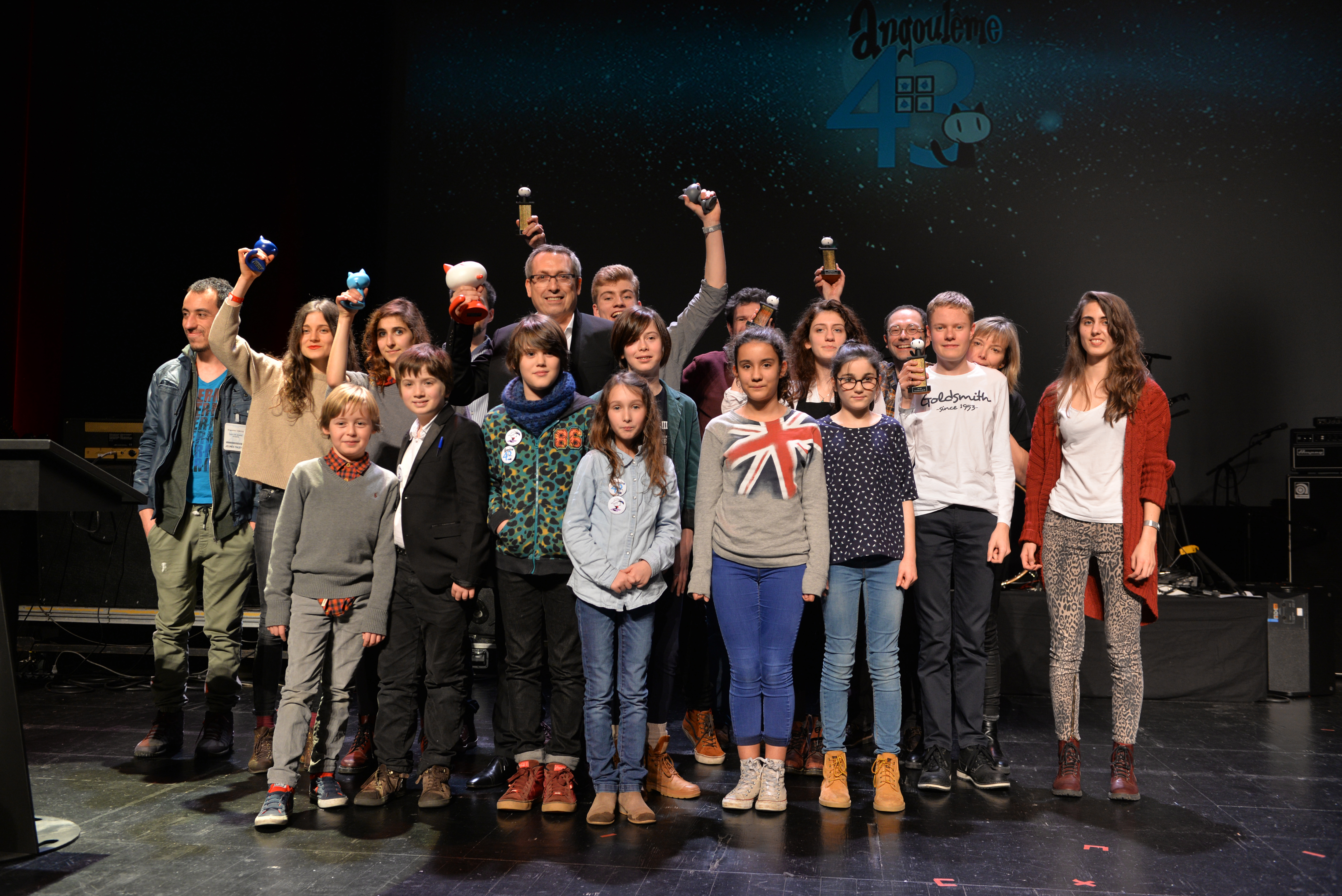 Lauréats des prix Jeunesse du Festival International de la Bande Dessinée d'Angoulême 2016.